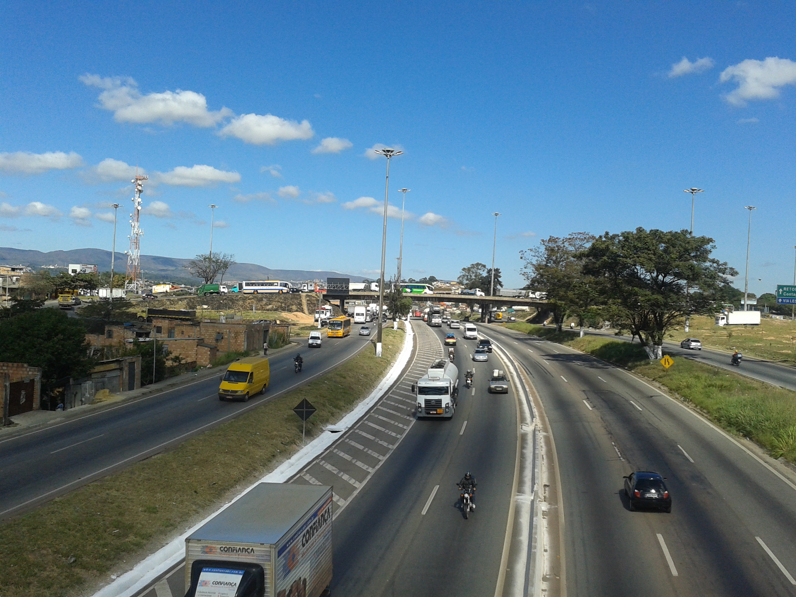 Vista do Anel Rodoviário em seu trecho de sentido BH-Acesso ao Rio de Janeiro-RJ